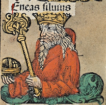 Зображення Енея Сільвія у Нюрнберзькій хрониці.